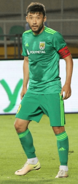 Нурбол Жумаскалиев в 2018 году